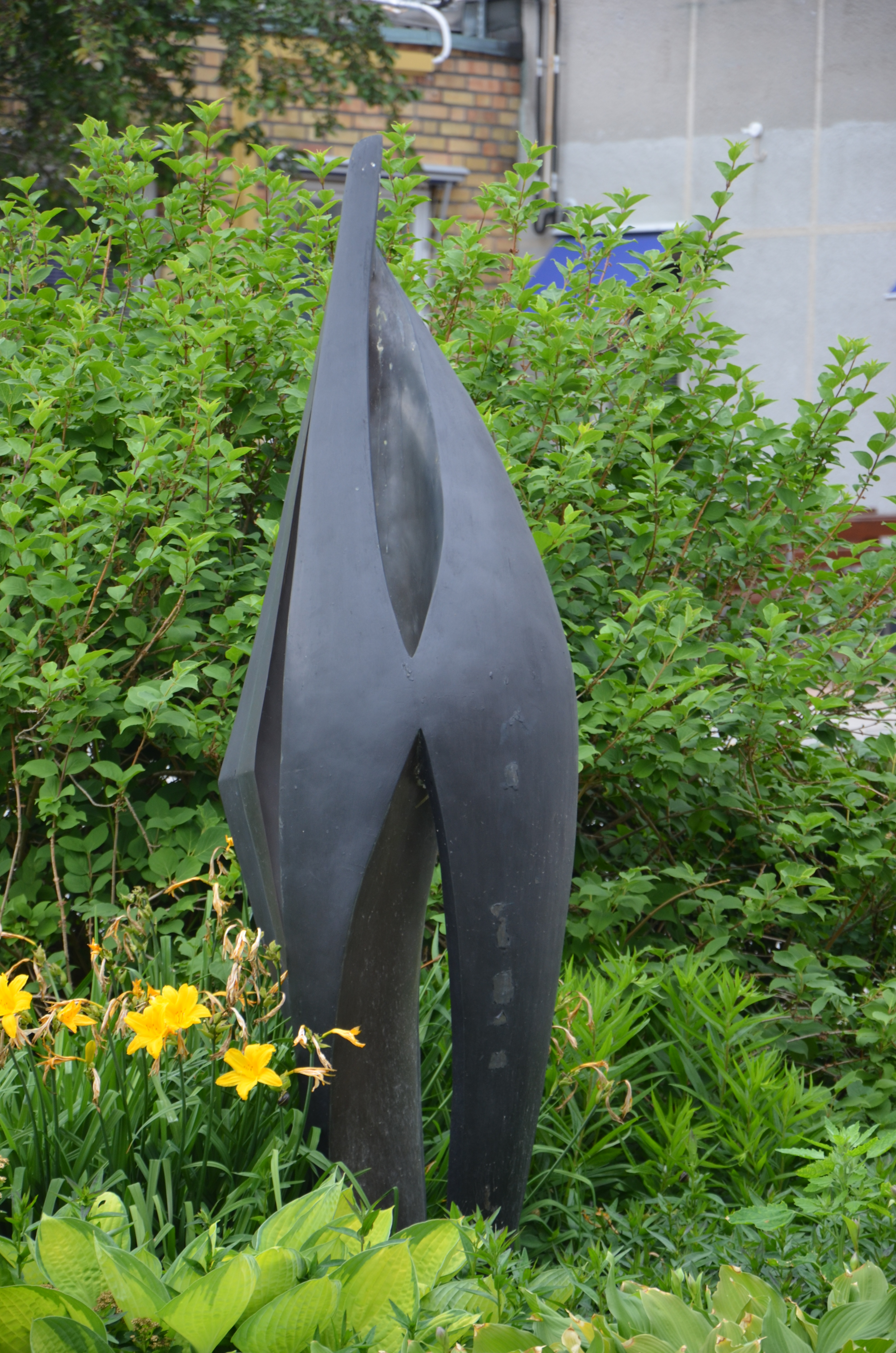 Stsffsn Östlunds Livslåga, brons, utanför Enköpings lasarett